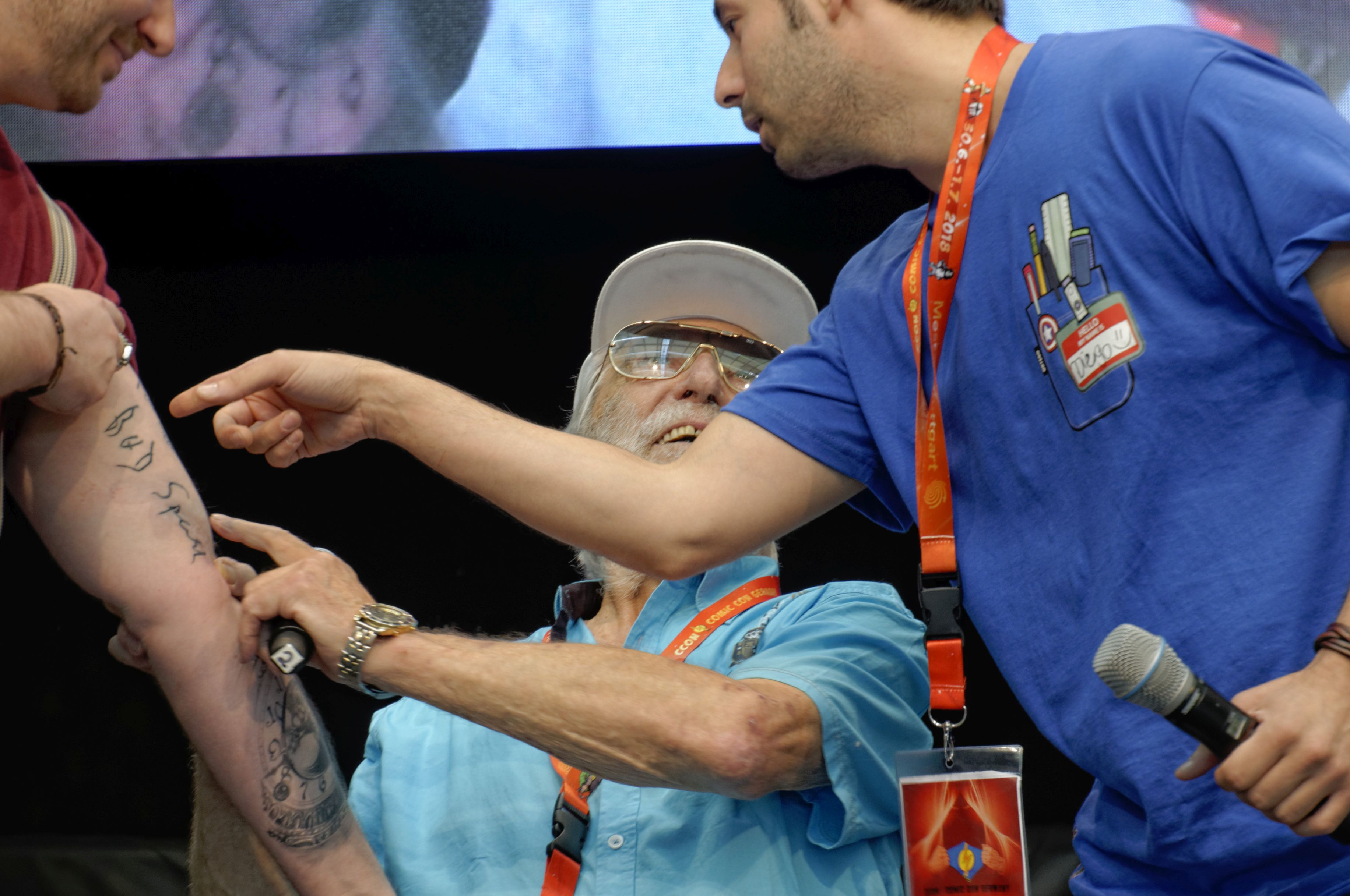 Bilder von der Comic Con Germany in Stuttgart 2018